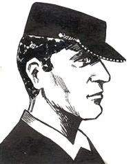 Brigadier Henry Reeve